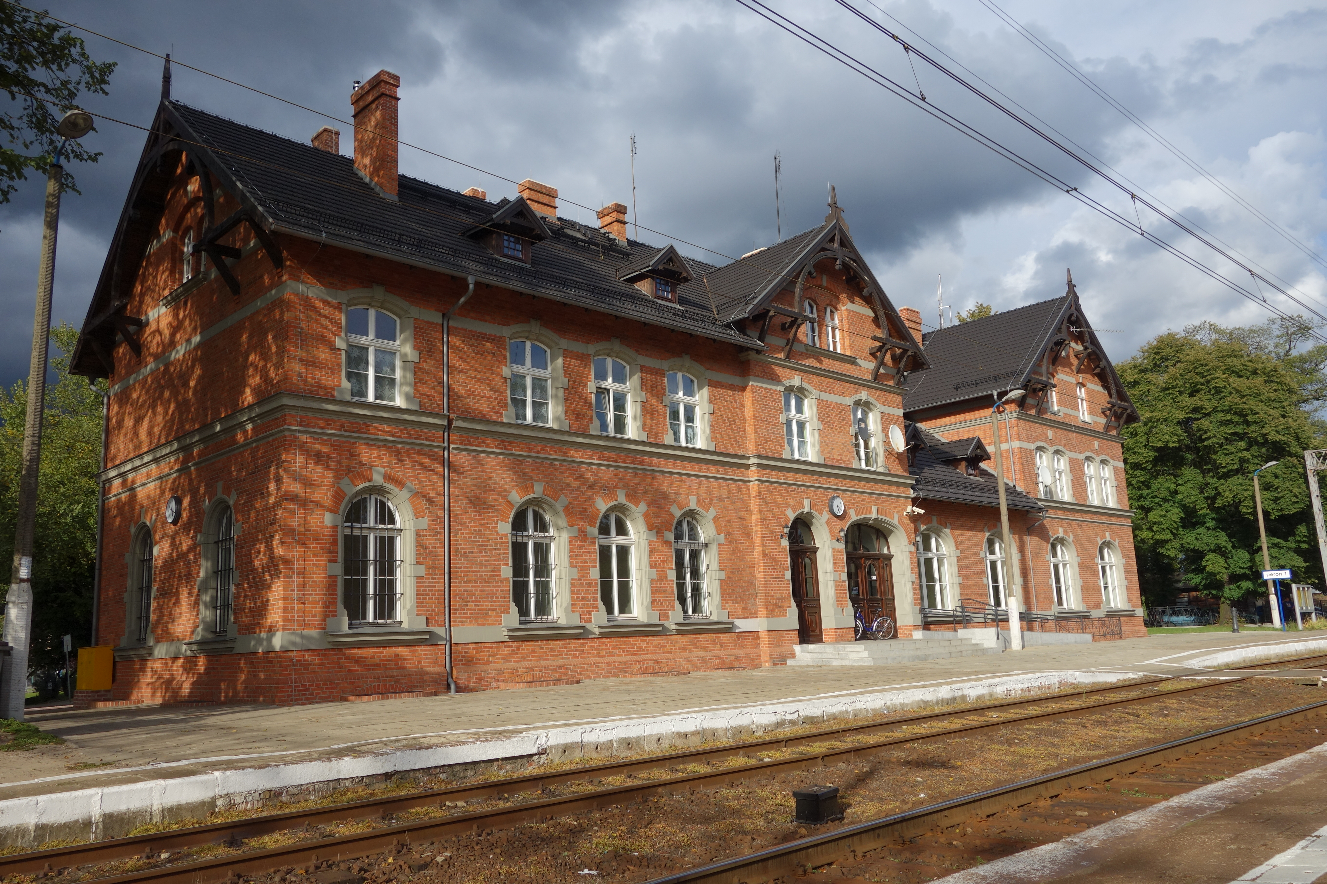 Wronki - dworzec kolejowy This photo was taken during Railway Wikiexpedition 2014 set up by Wikimedia Polska Association. You can see all photographs in category Wikiekspedycja kolejowa 2014. English | Polski | +/−